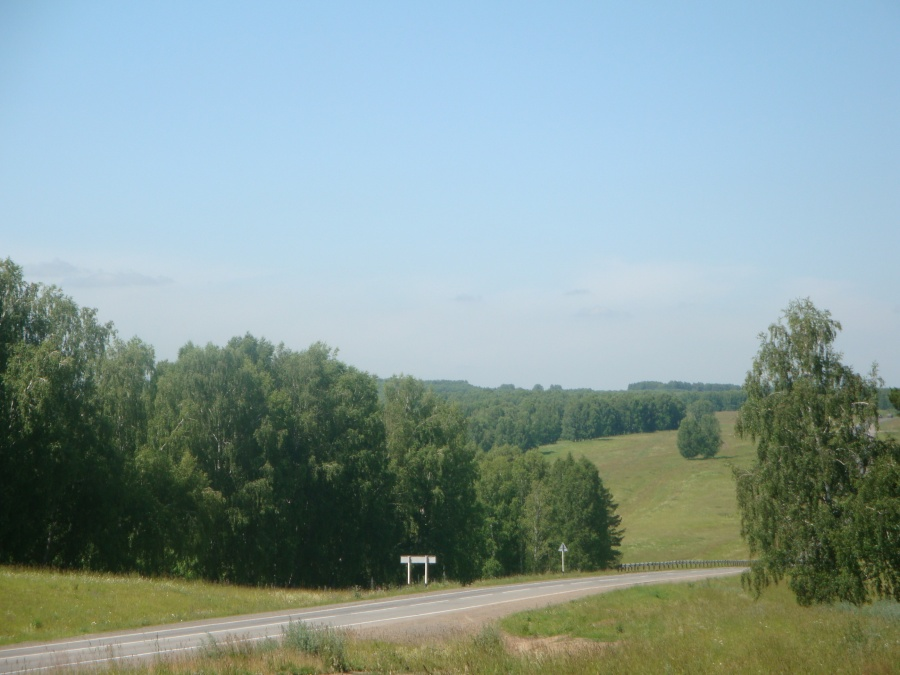 Трасса "Новосибирск-Ленинск-Кузнецкий"